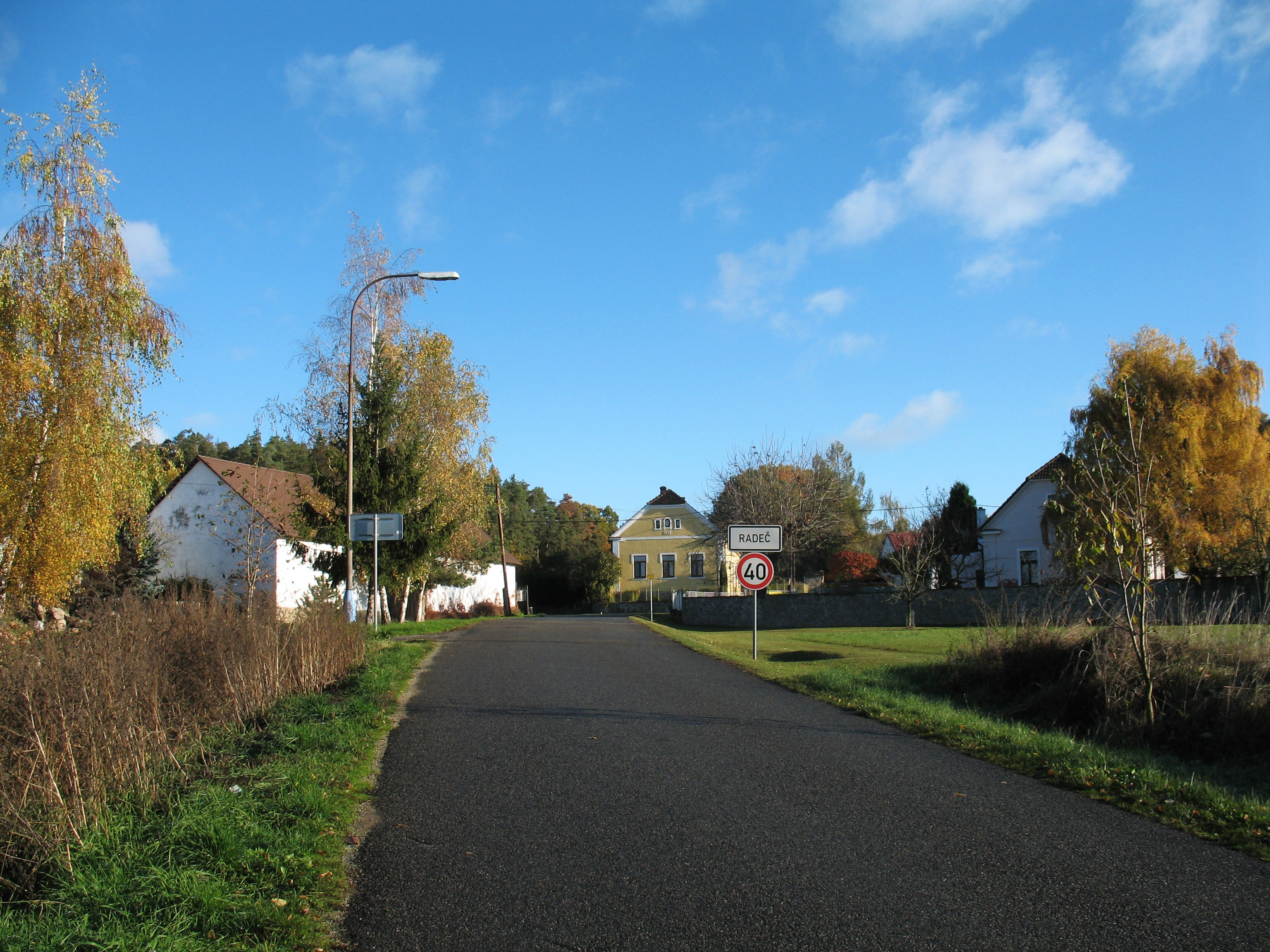 Pohled od silnice do Nedrahovic